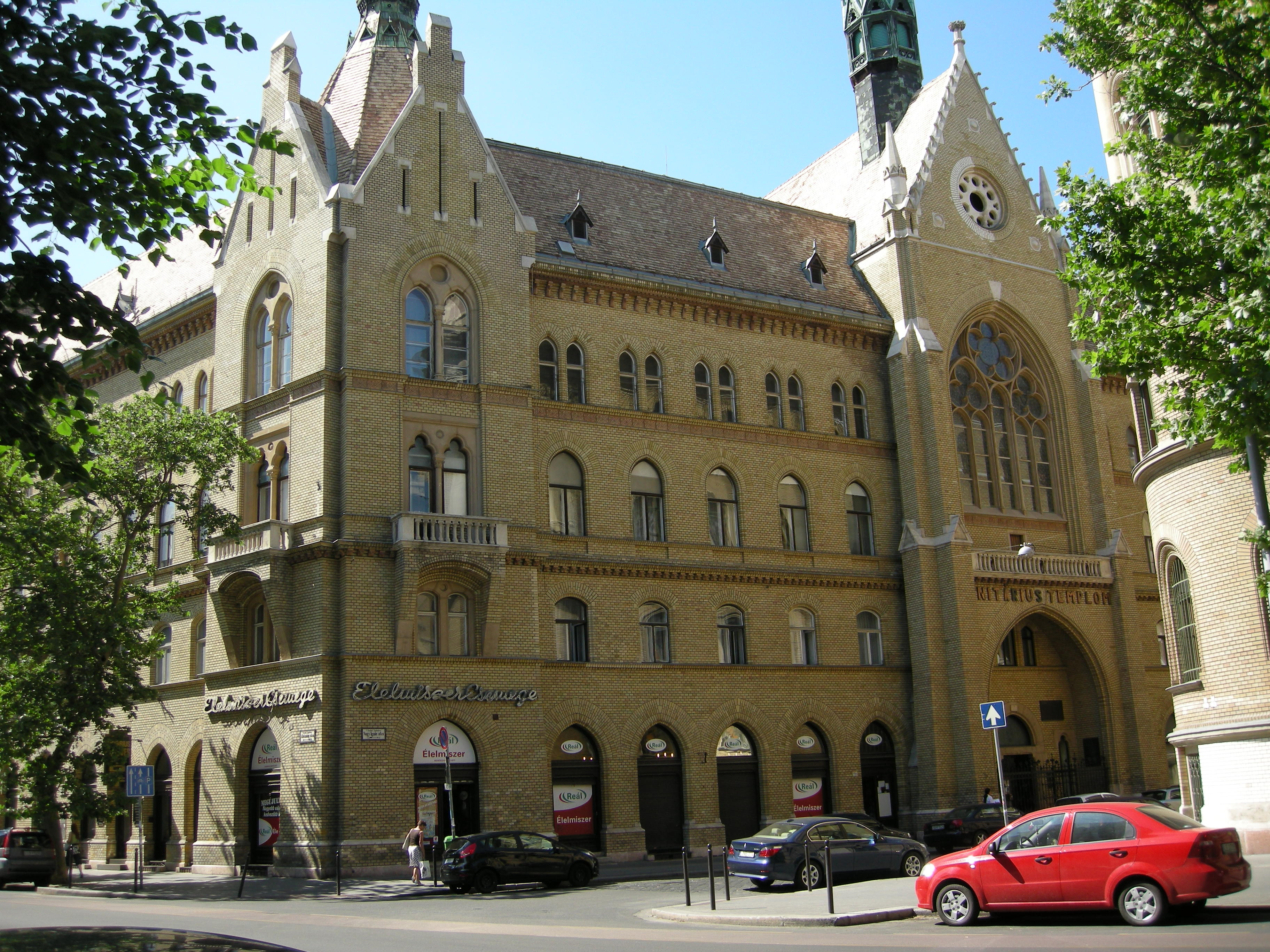 Budapest